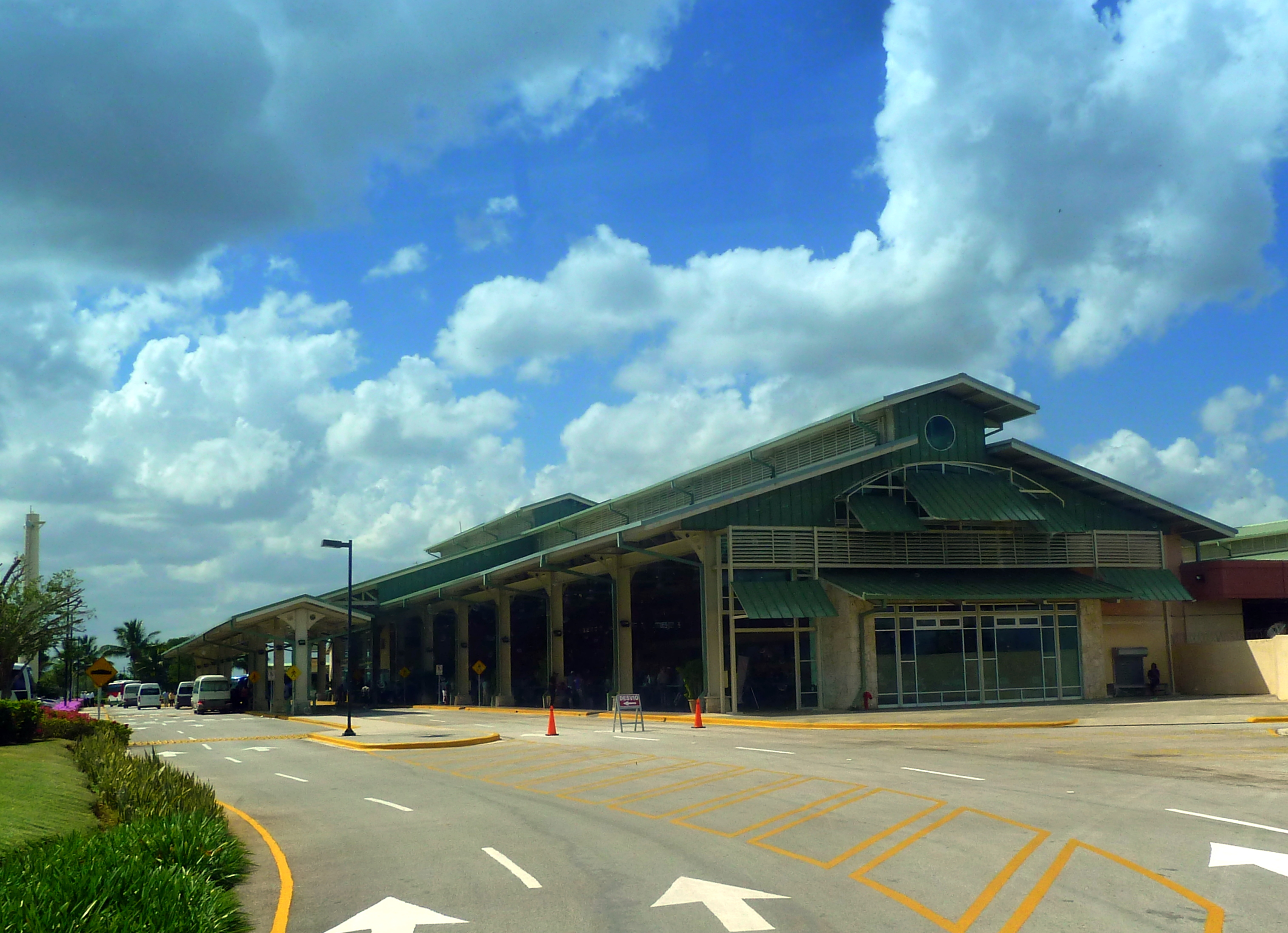 International Airport La Romana – voor de passagiers terminal.